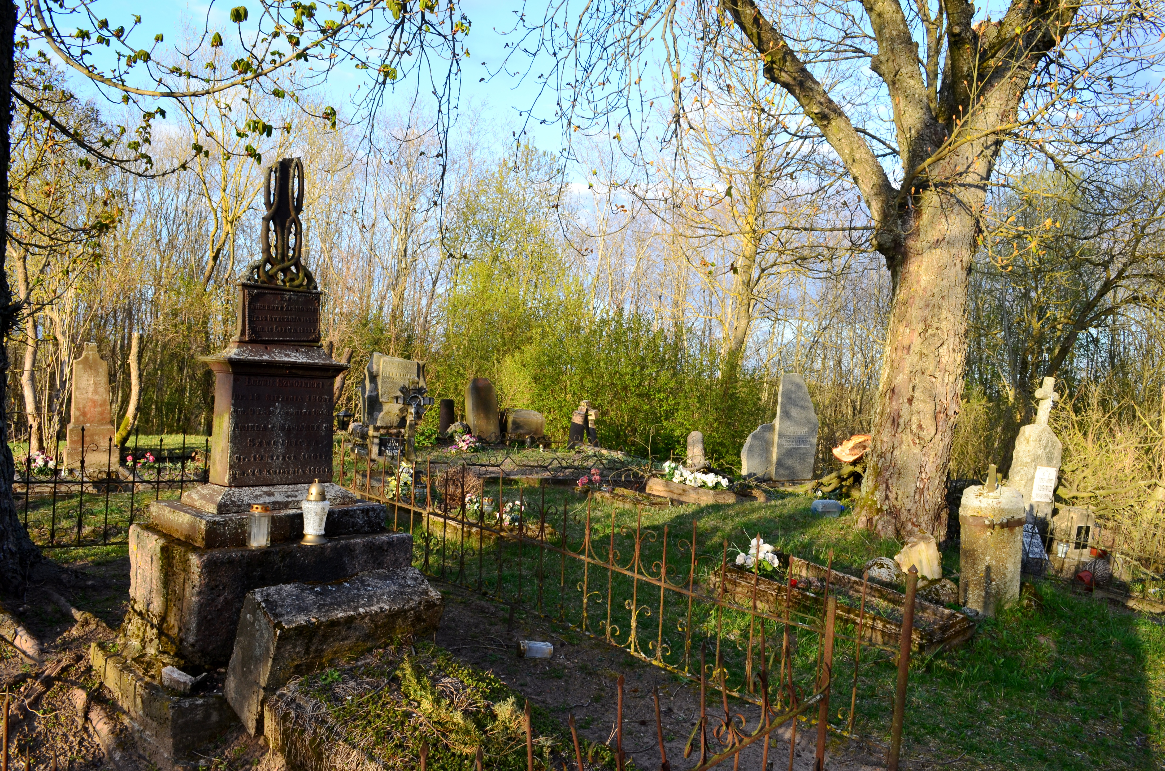 Daukšių k. kapinės, Kėdainių raj.